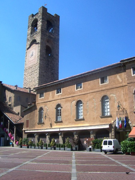 Bergamo - Torre Civica (Campanone) vista da Piazza Vecchia